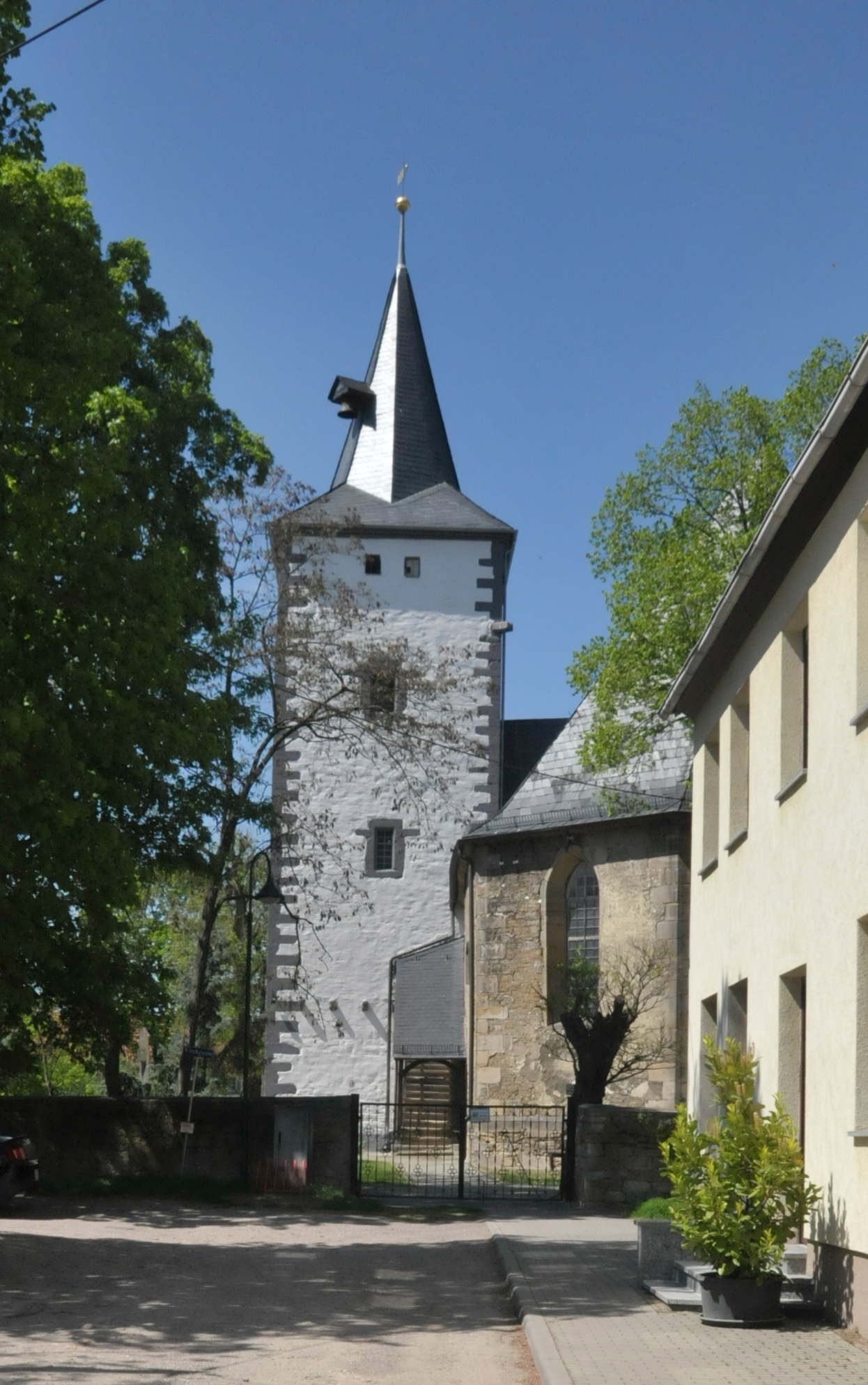 Udestedt, St. Kilian 2016